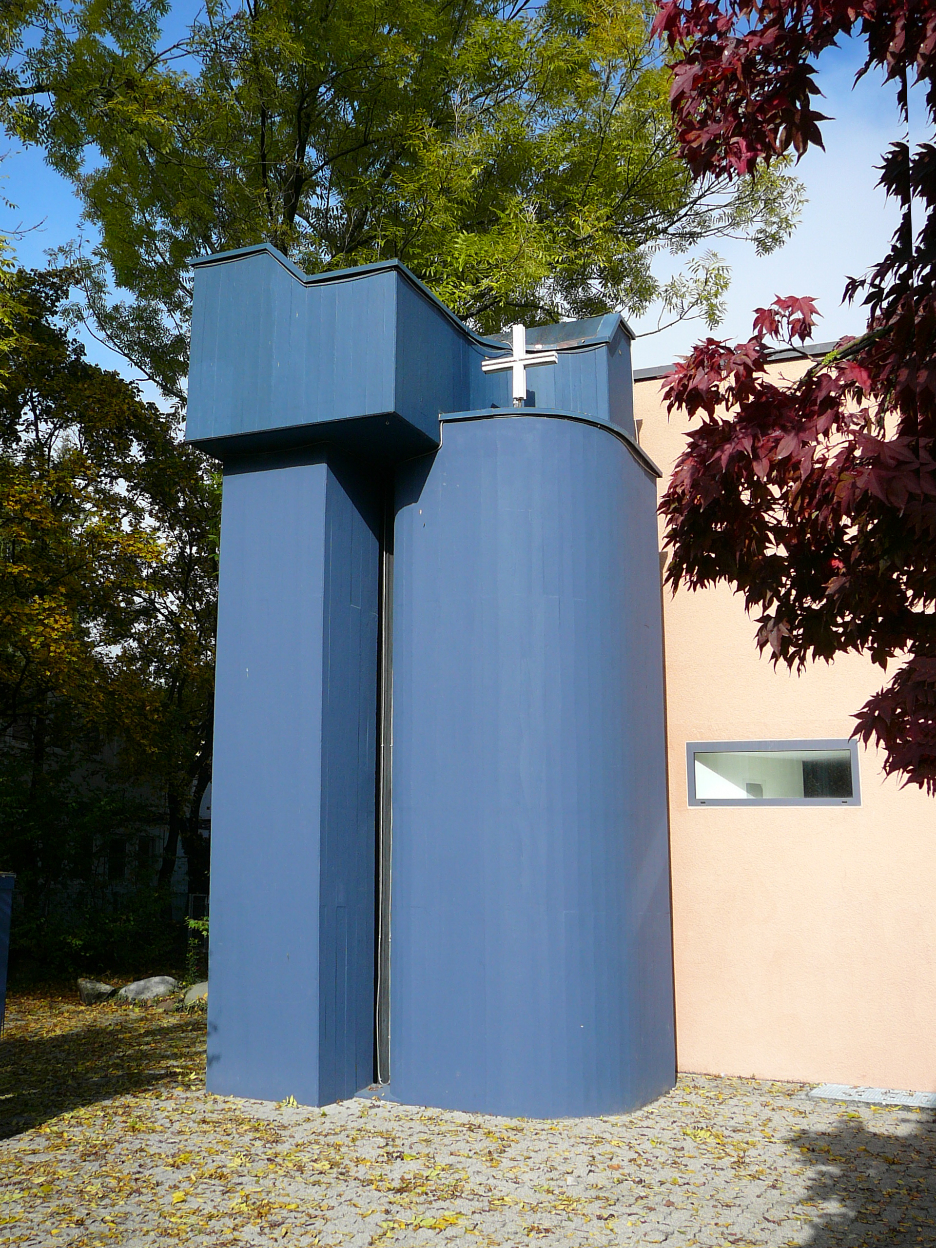 Römisch-katholische Pfarrkirche Heilig Geist Zürich-Höngg, Kirchturm